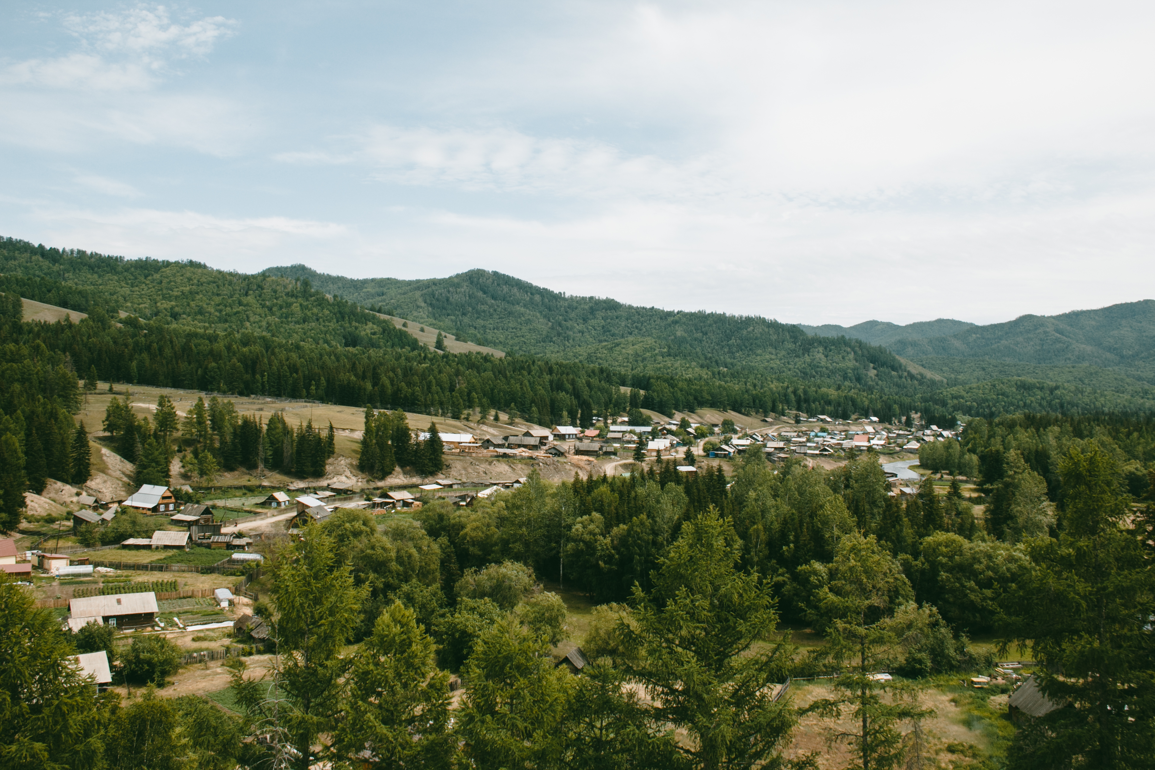 с.Сизим Каа-Хемский район РТ